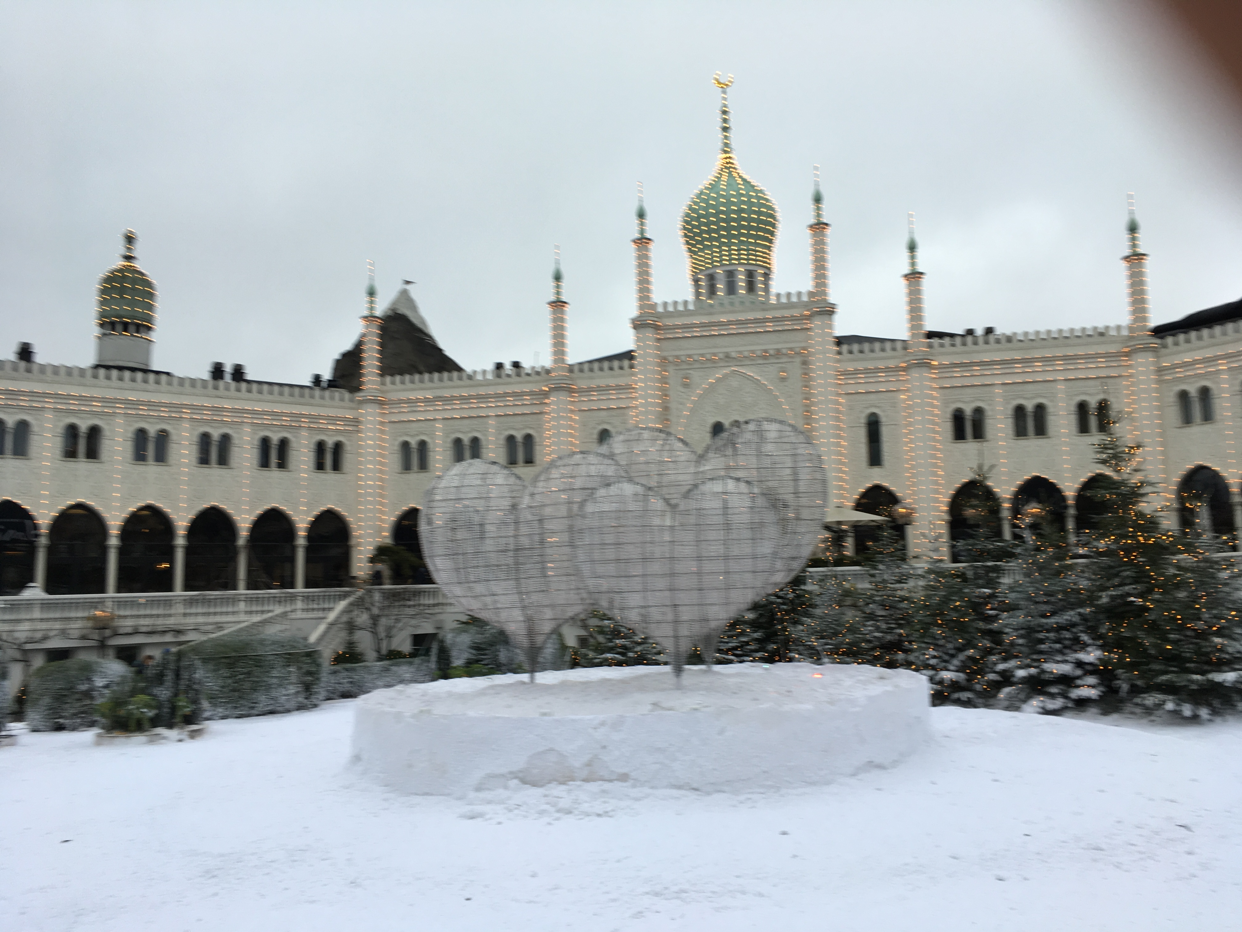 Nimb hotel i tivoli Danmark, 15 december 2018.